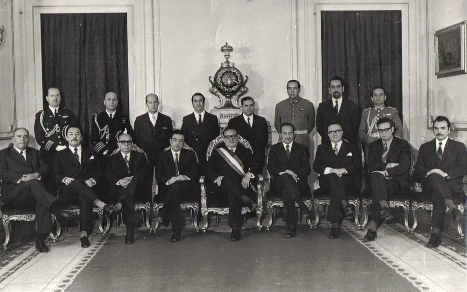 Gabinete del Gobierno de Salvador Allende.